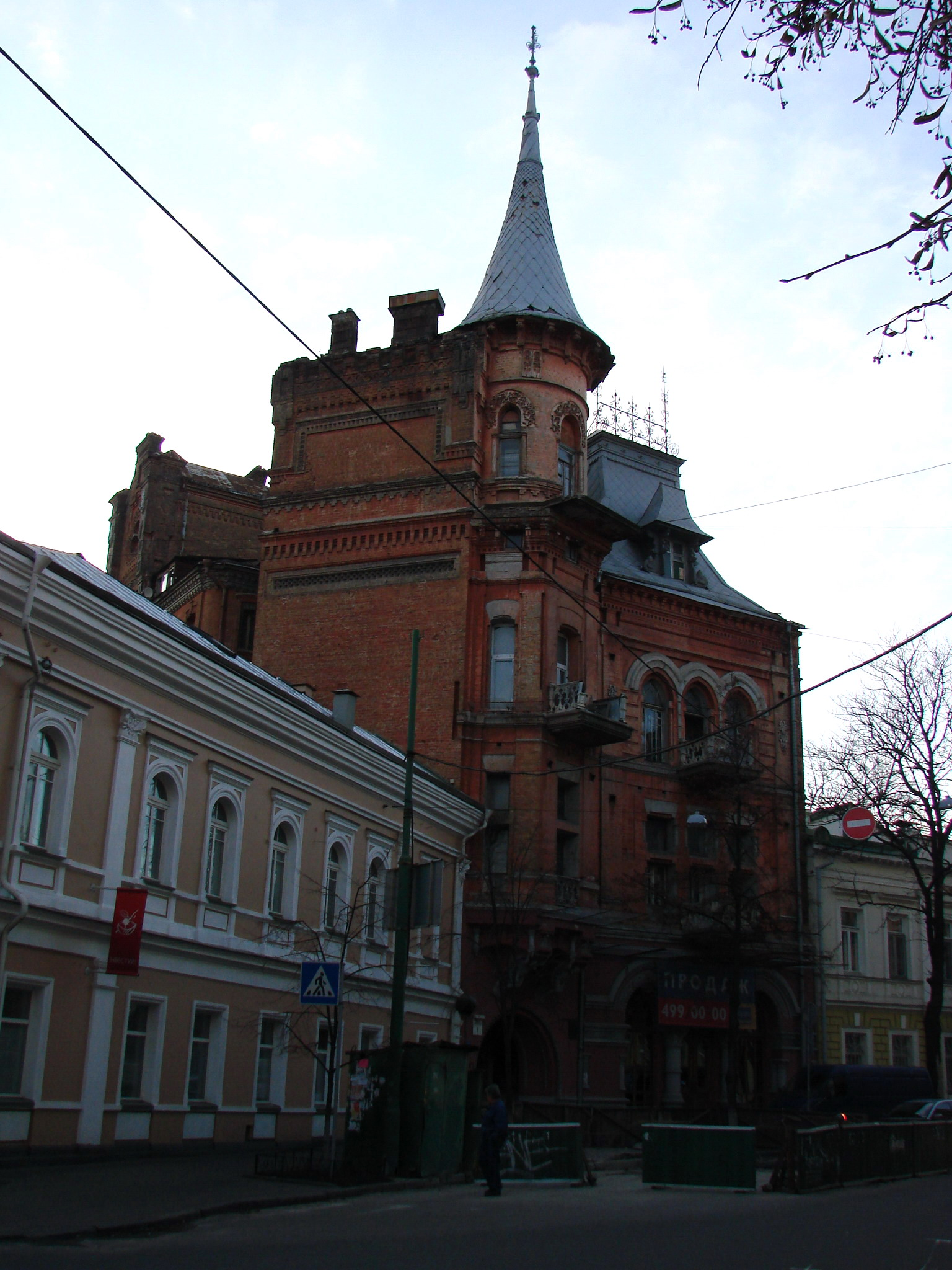 Будинок прибутковий (1896-1898) вул. Ярославів вал, 1, Київ